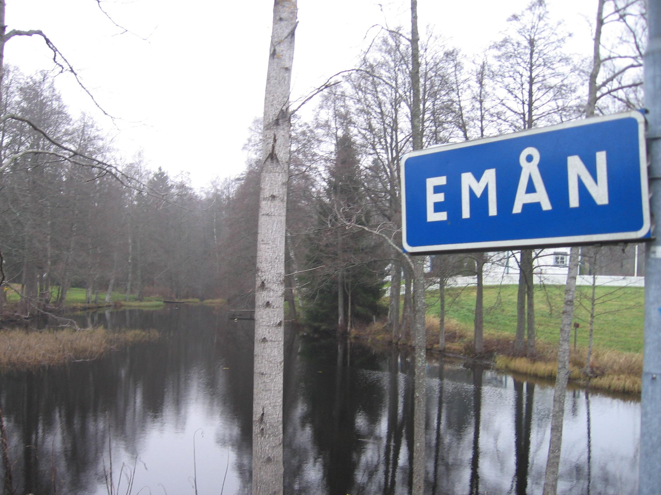 Emån i Bodafors.